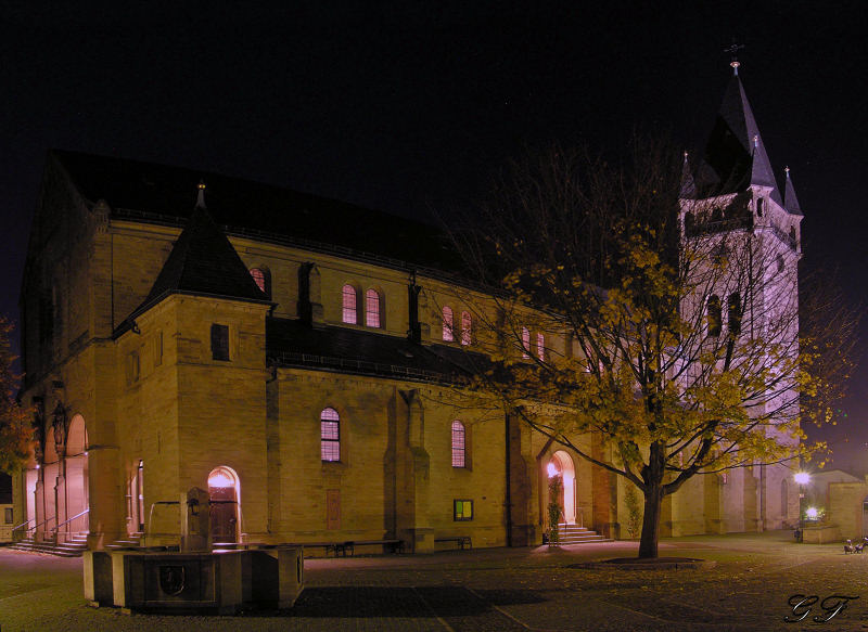 Pfarrkirche St. Caecilia Oestringen